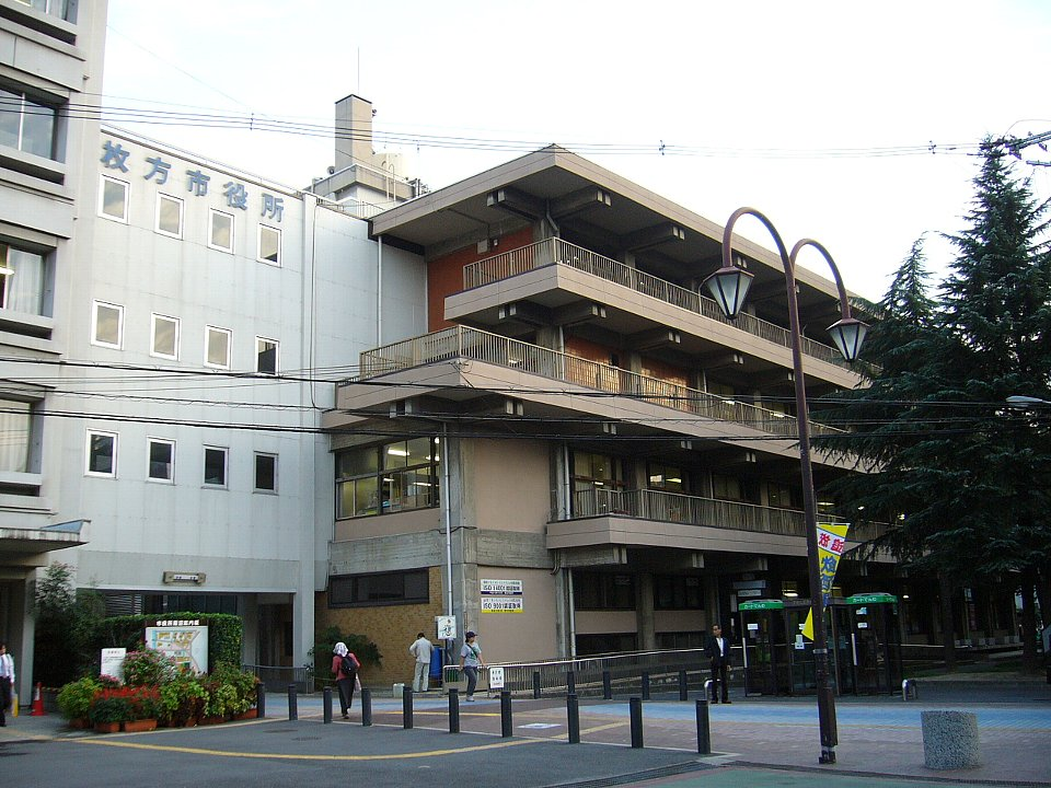 Hirakata City Hall in Osaka-fu, Japan